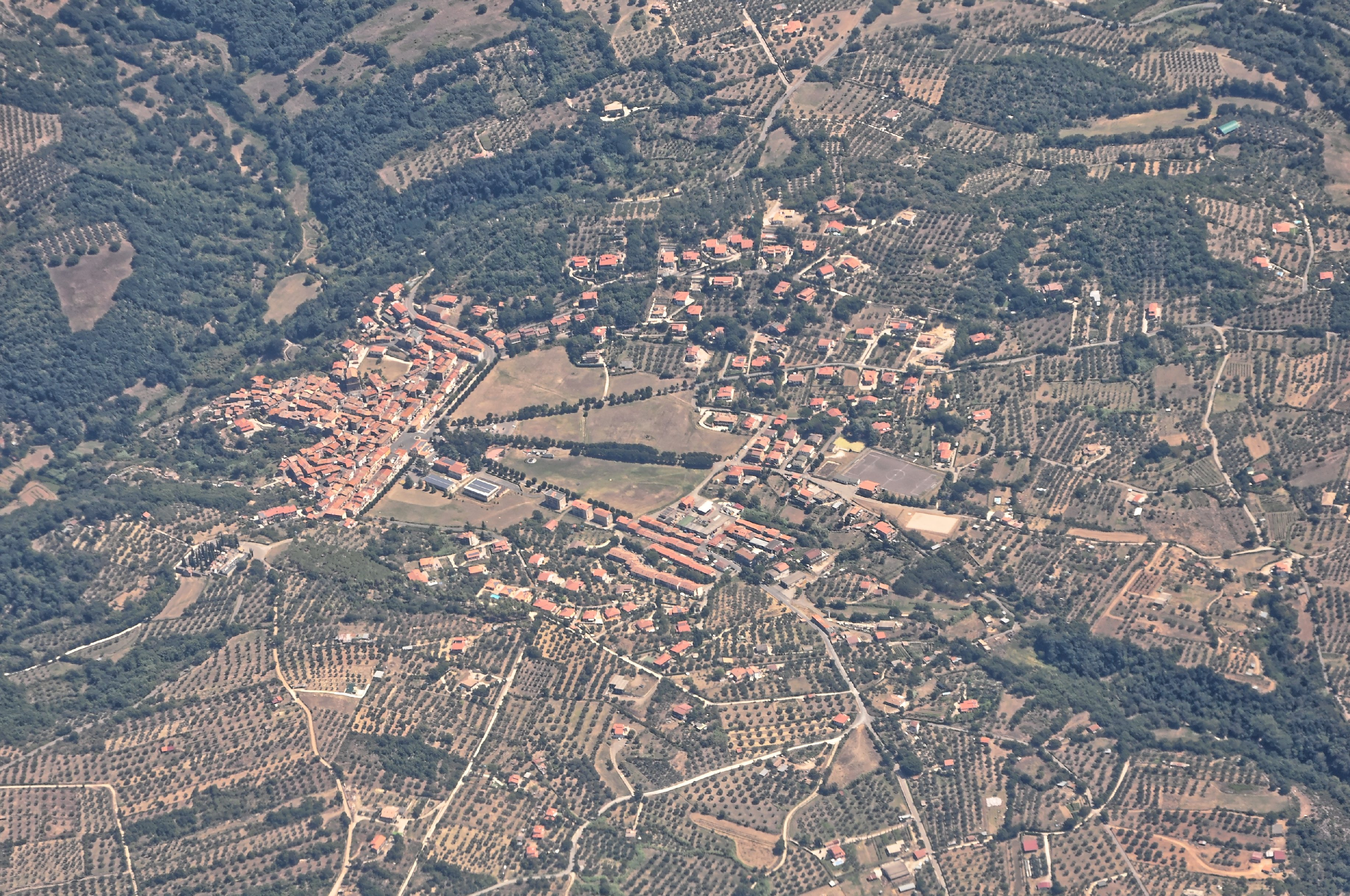 Bilder vom Flug -Rom-Düsseldorf-Hamburg 2013 Dieses Foto entstand in Zusammenarbeit mit Stadtbesichtigungen.de Die Seiten Stadtbesichtigungen.de, der dazugehörige Reise Blog sowie die Facebookseite: Stadtbesichtigungen Rom dürfen dieses Bild für Ihre Veröffentlichungen ohne den Hinweis auf Wikipedia, Commons bzw der Lizenz verwenden. Die Verantwortlichen habe von mir (Ra Boe) die Originaldaten zur freien Verfügung übermittelt bekommen.